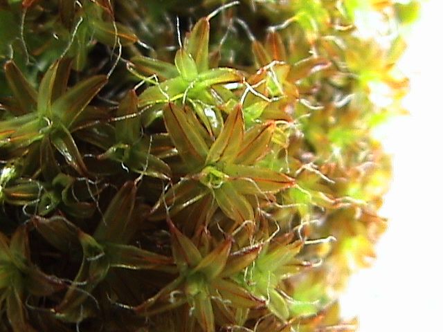 Dach-Drehzahnmoos (Tortula ruralis)